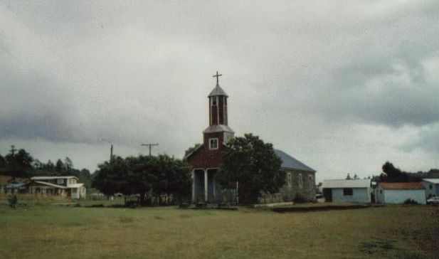 Centro del poblado de San Agustín, San Agustín, Isla Lemuy, Provincia de Chiloé, Chile